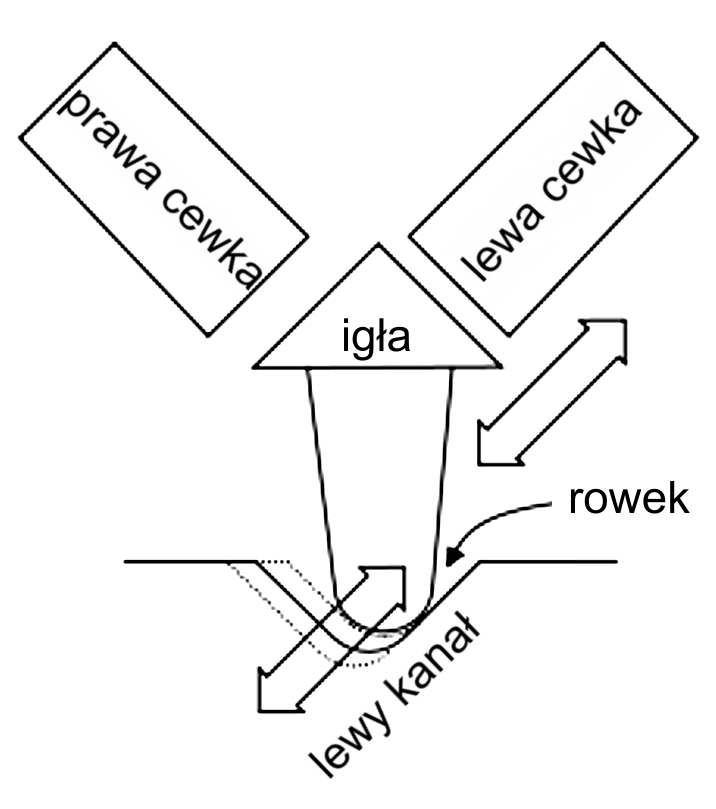 Zasada działania wkładki gramofonowej